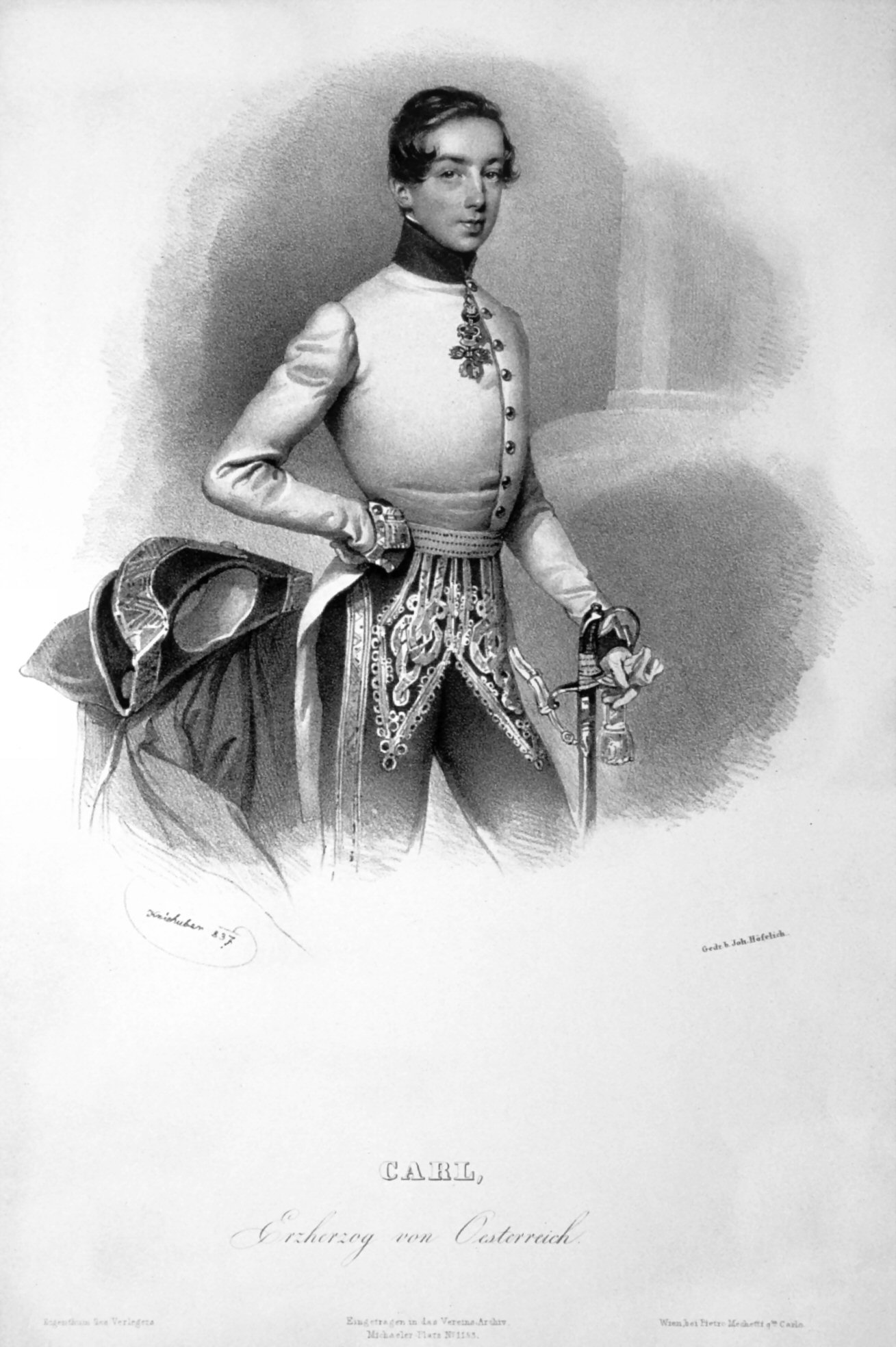 Karl Ferdinand von Österreich (1818-1874), Erzherzog, General der Kavallerie. Lithographie von Josef Kriehuber, 1837